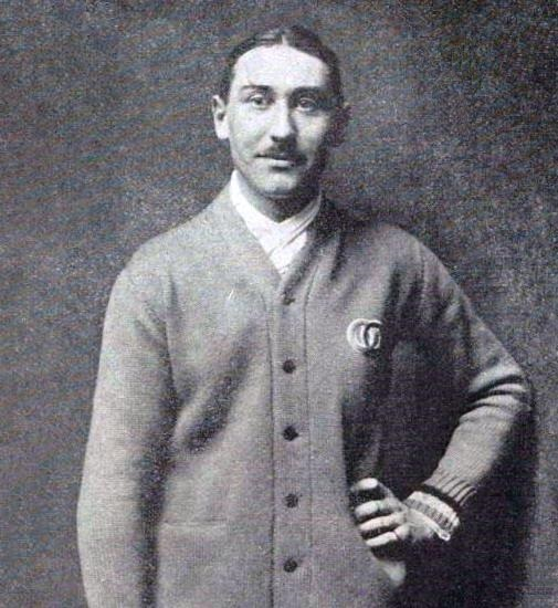 André Gobert en 1919.